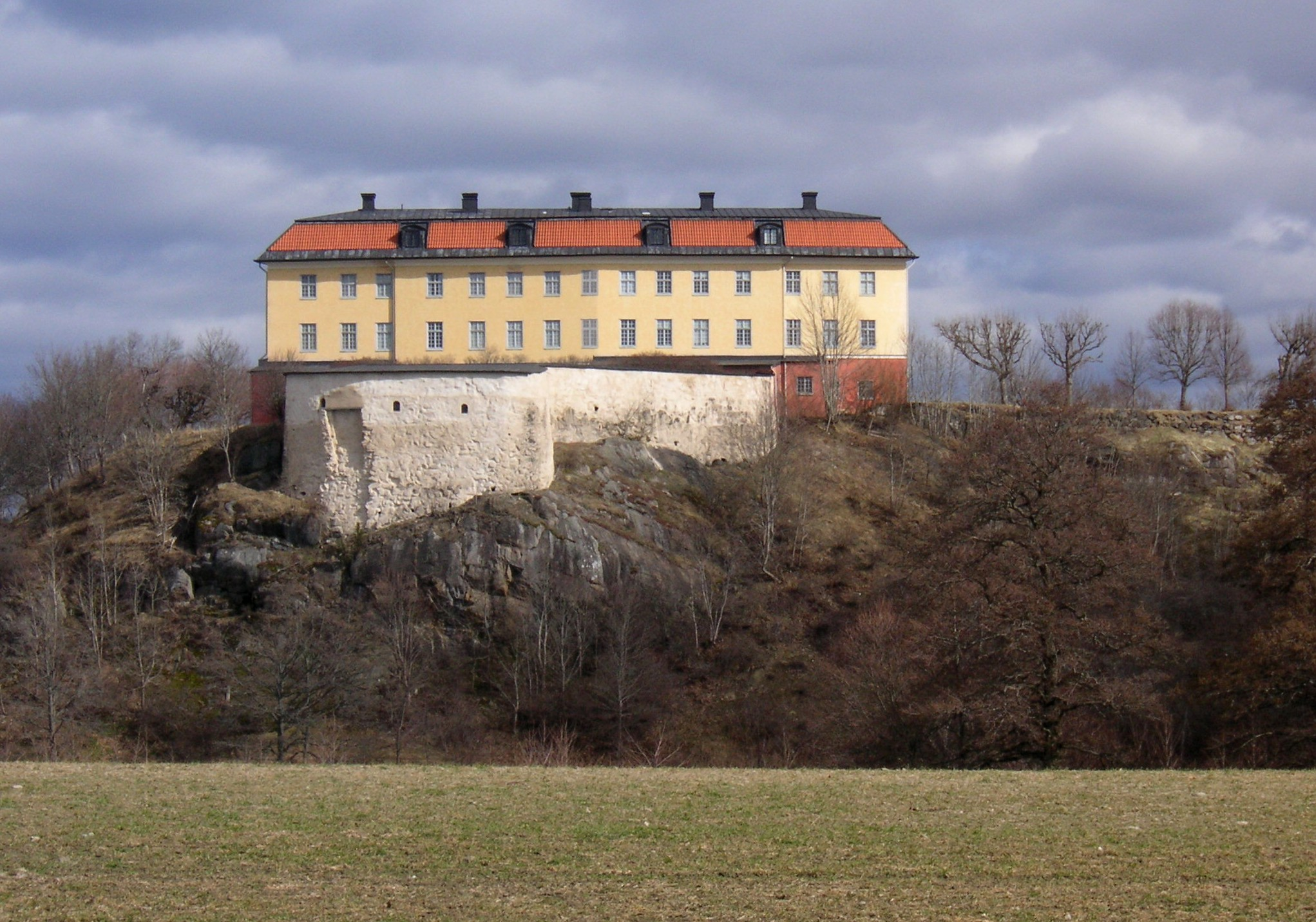 Hörningsholms slott, fasad mot väst